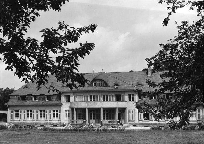 12. Internationale Ferienkurse für neue Musik, Darmstadt Seminar Marienhöhe (Dozentenhaus und Unterrichtsgebäude) Information added by Wikimedia users.Gebaut 1912 für die Tanzschule von Elizabeth Duncan.